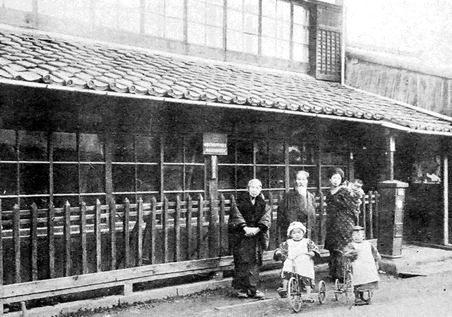 斎藤活版所、長三と家族